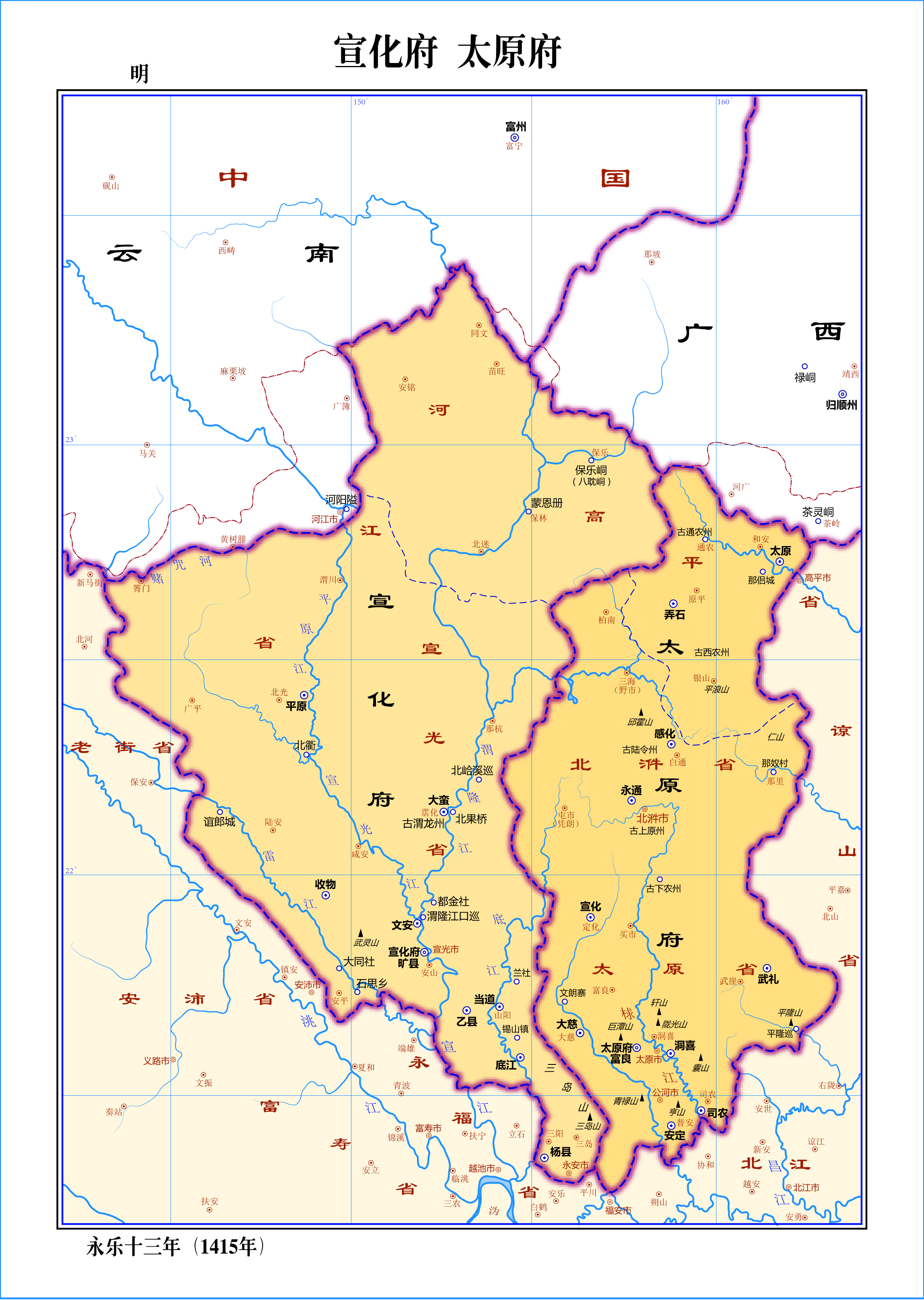 中文（台灣）: 明代交阯承宣布政使司宣化府及太原府圖